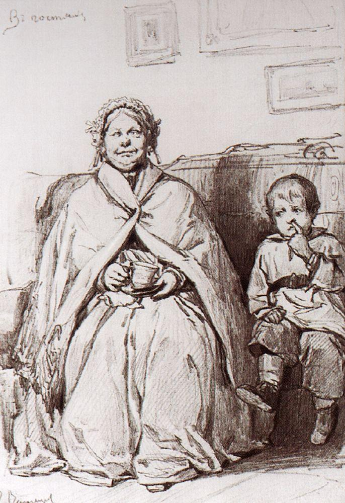 В гостях